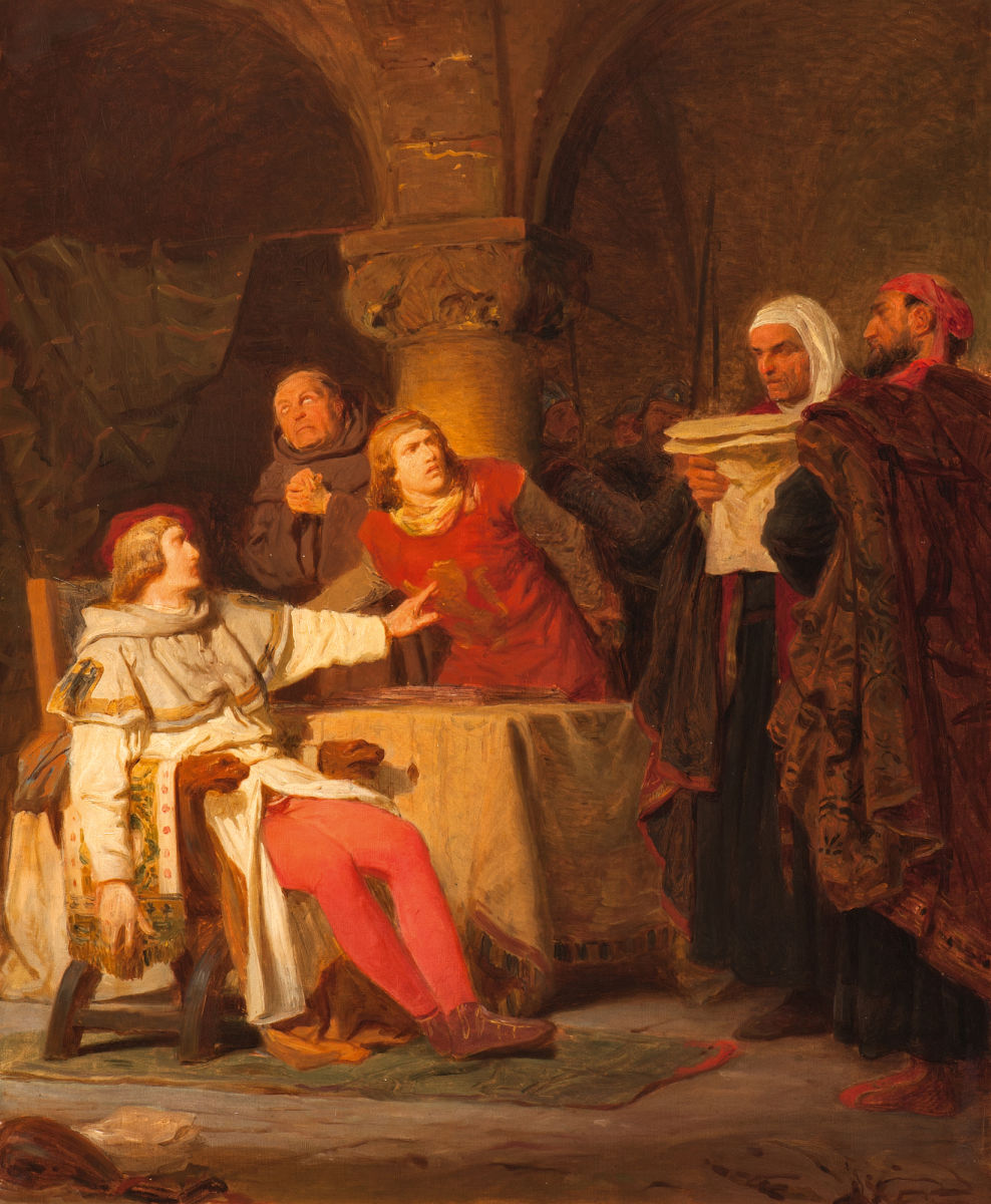 Konradin von Hohenstaufen und Friedrich von Baden das Todesurteil hörend, Studie, Öl auf Leinwand. 68,3 x 57,4 cm. Studie zum Gemälde von 1866 in der Staatlichen Kunsthalle Karlsruhe (Bartmann 1866/1). Provenienz: Ehemals Margaretha Freifrau von Reischach-Scheffel, Karlsruhe Villa Grisebach, Berlin, 29. Mai 2013, Los 188